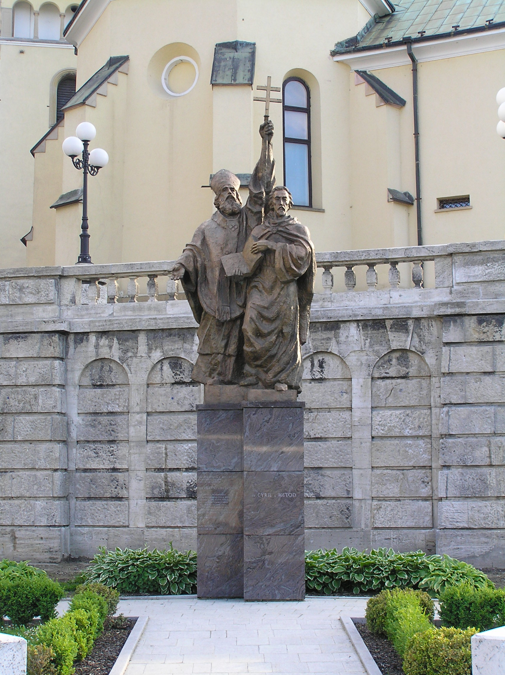 Súsošie Cyrila a Metoda na popredí kostola Najsvätejšej Trojice Námestie Andreja Hlinku, Žilina